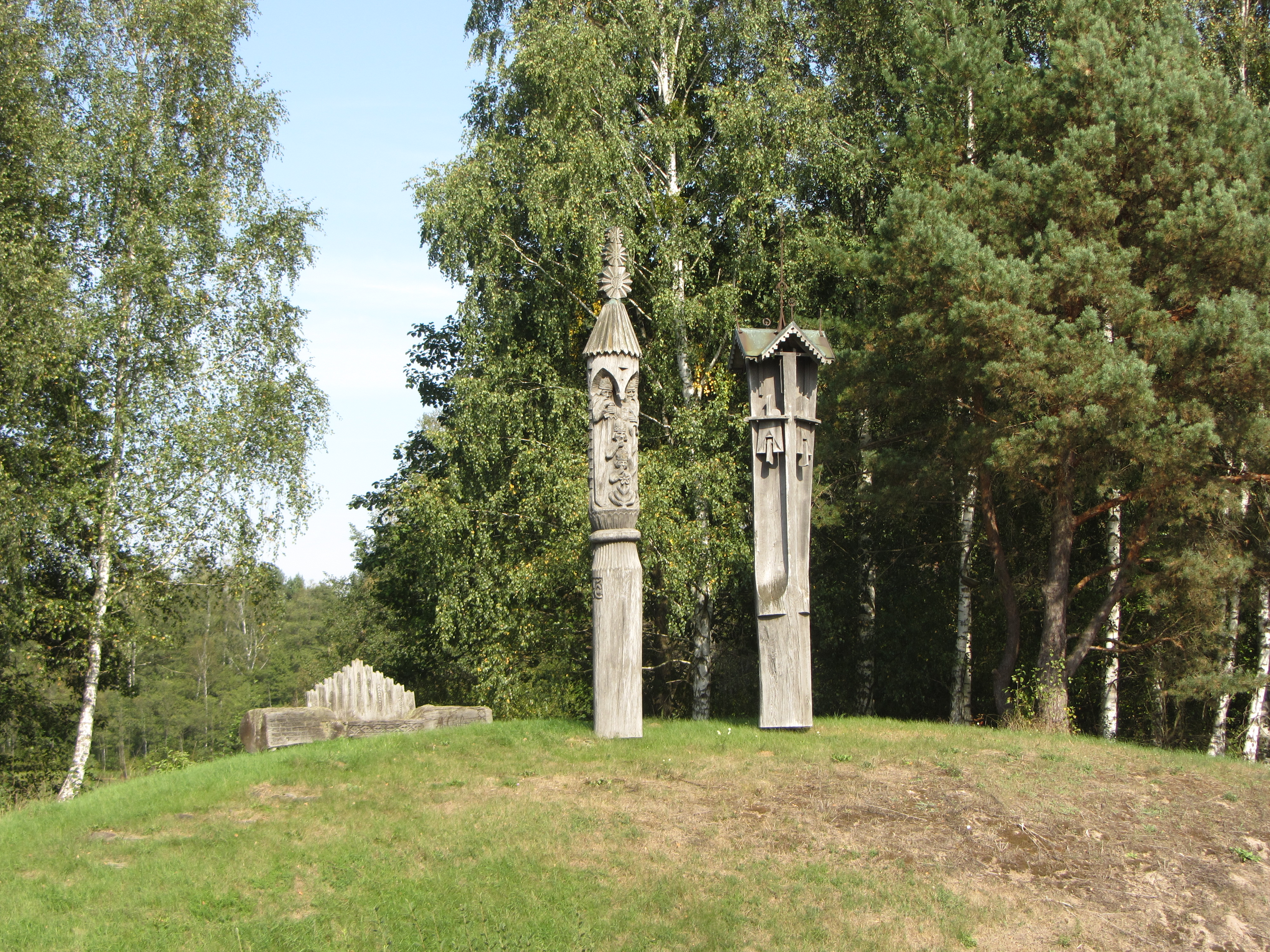 Merkinės sen., Lithuania